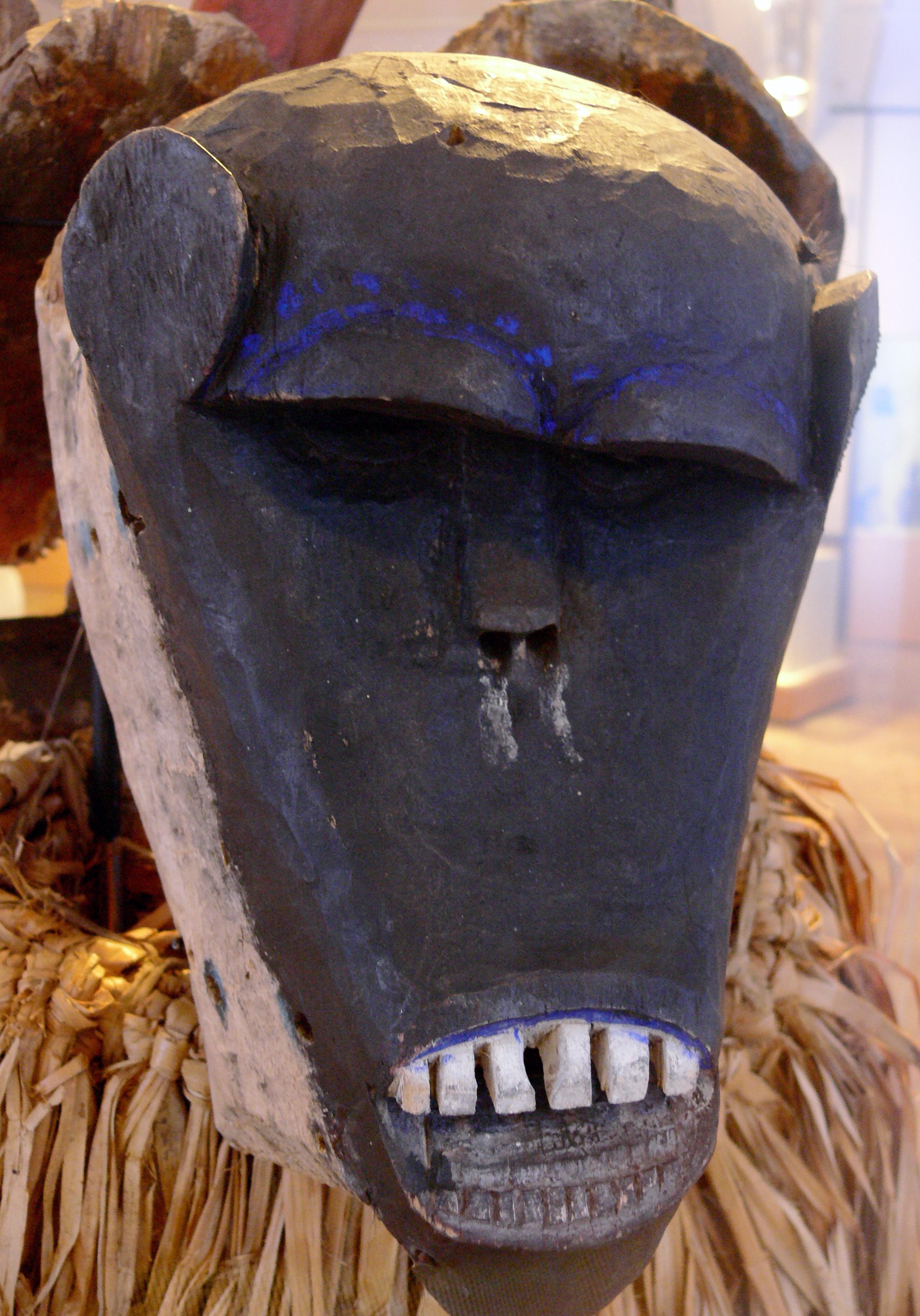 Stuttgart, Linden-Museum Affe (Gesichtsmaske eines Dye-Männerbunds), Guro, Inv. Nr. F 50110; umgeben vom Teil eines Dye-Maskengewandes aus Plamblatt-Streifen